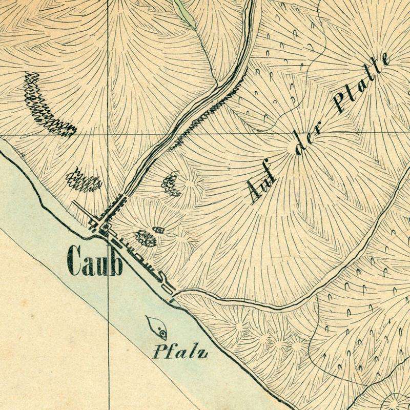 Ausschnitt der Stadt Kaub aus der Karte vom Herzogthum Nassau : von den im Jahr 1819 geschehenen Aufnahmen längs der Preussischen und Hessischen Gränzen etc. ; orientirt nach Parallelen vom Meridian und Perpendikel von Paris